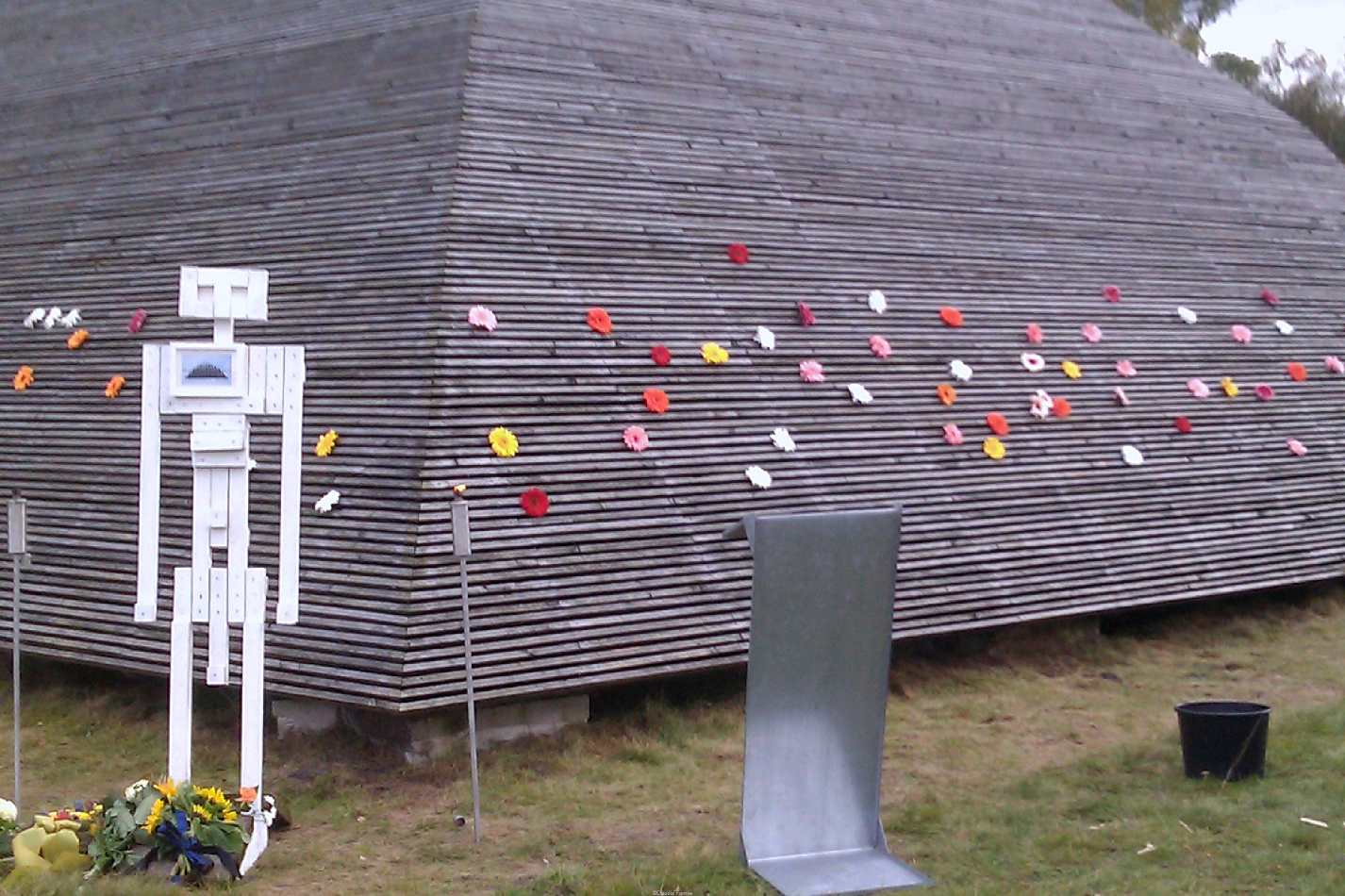 Gedenkfeier für Jörg-Werner Schmidt am 16. Oktober 2010